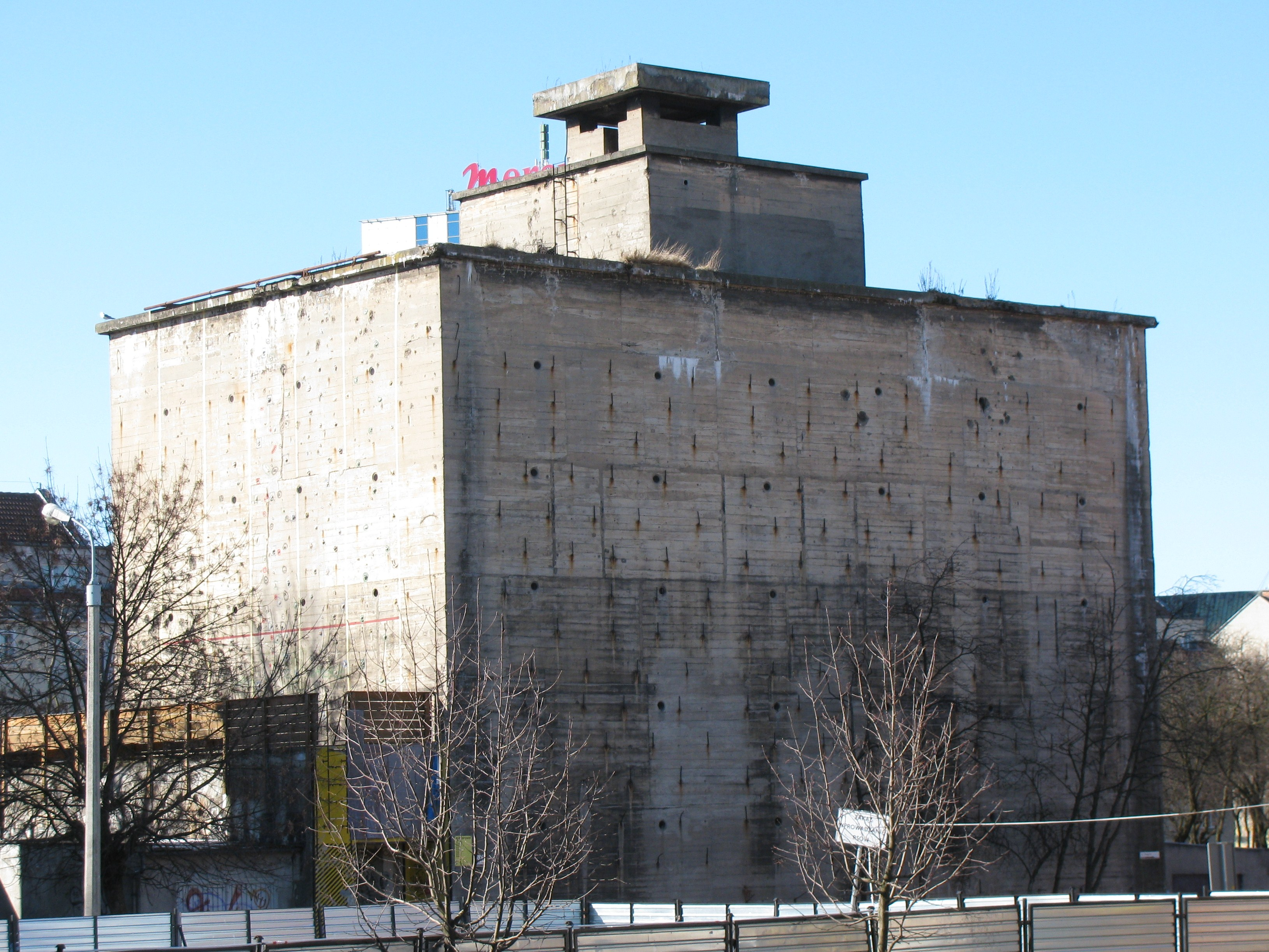 Niemiecki schron przeciwlotniczy z okresu II wojny światowej. Stał w ciągu budynków (obecnie nieistniejących), "udając" przed bombowcami zwykłą kamienicę. Widoczny z samolotu nie odróżniał się od domów. Centrum Gdańska, ulica Olejarna.